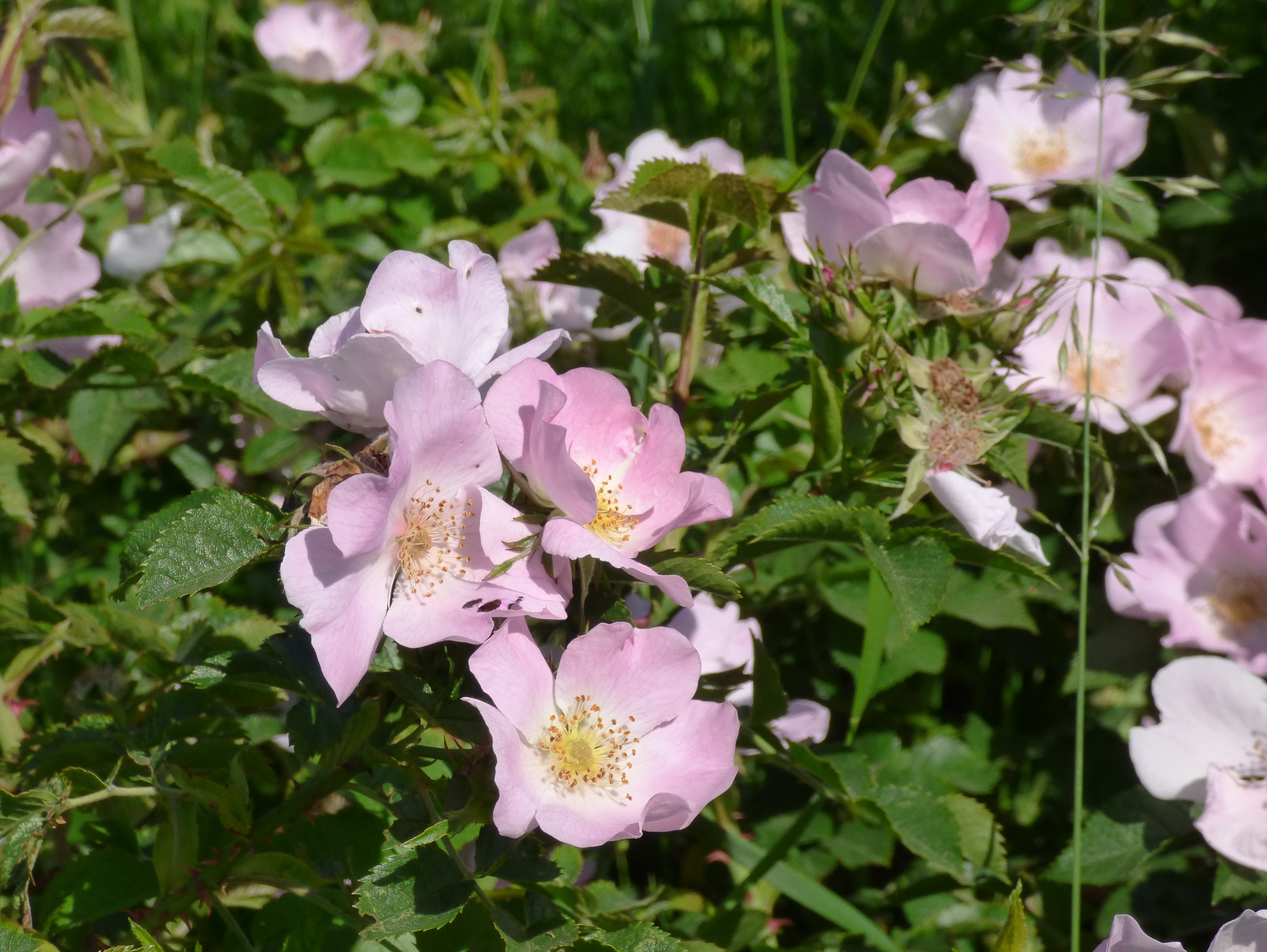 Dzika róża, Czarnorzecko-Strzyżowski Park Krajobrazowy, Odrzykoń, czerwiec 2016 r.